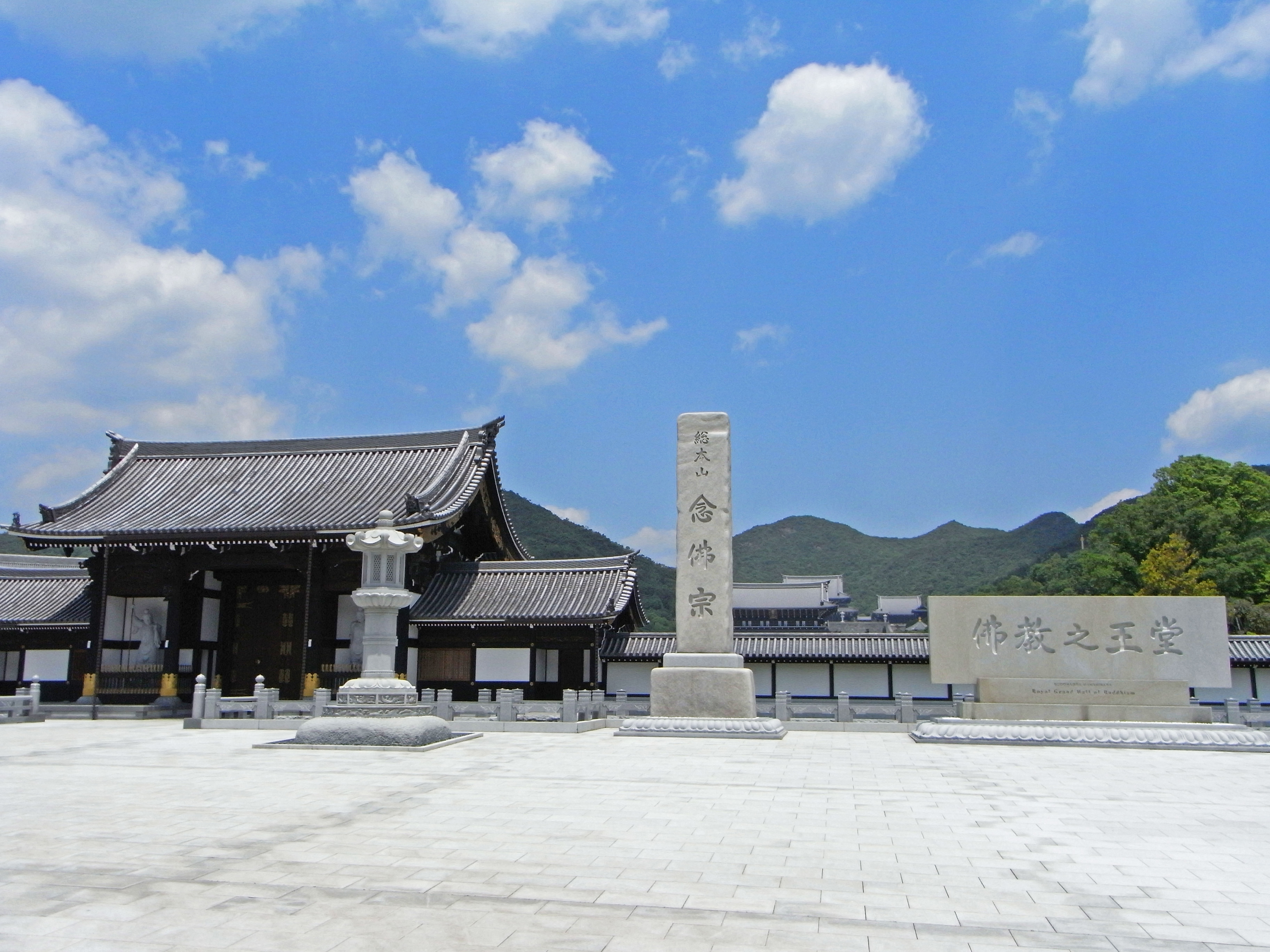 念仏宗(念佛宗)無量寿寺「佛教之王堂」総門